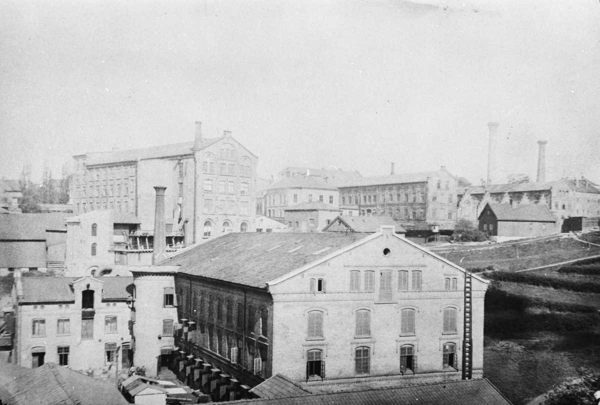 Den Norske Hesteskosømfabrik var en industribedrift ved Akerselva i Oslo, grunnlagt 1881. Bedriften hadde fabrikkanlegg i Thorvald Meyers gate 1 ved Akerselva; «Hønse-Lovisas hus» (Sandakerveien 2) hørte også til eiendommen.